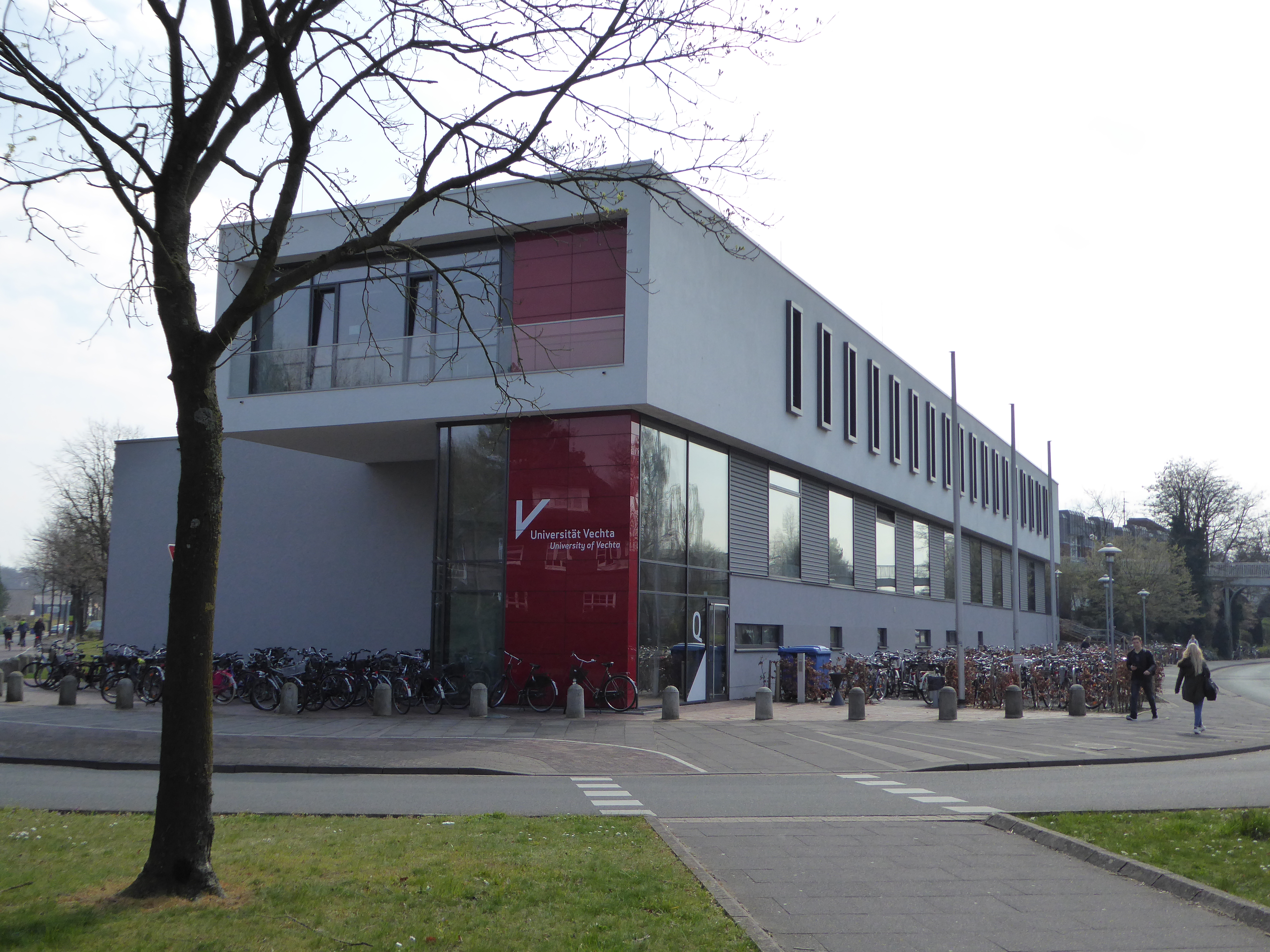 Jüngstes Gebäude der Universität, zum Wintersemester 2012/2013 eingeweiht. Zwei Hörsäle und sechs Seminarräume finden sich hier.